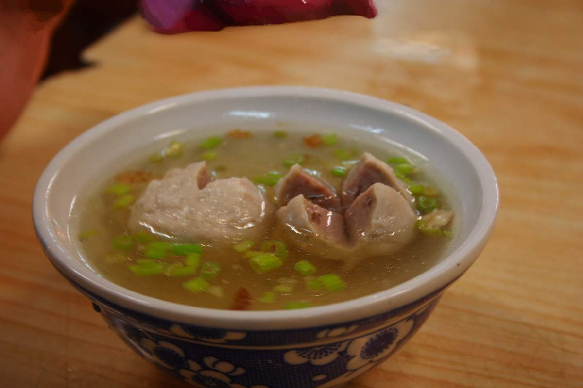 中文（台灣）: 貢丸湯